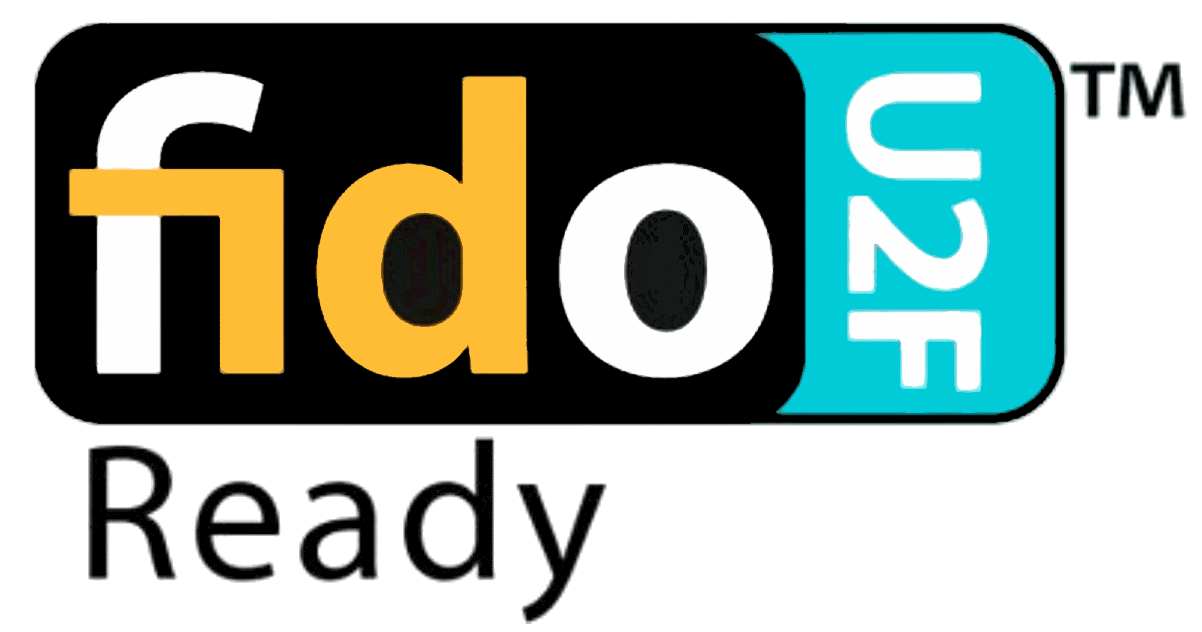 Logo von